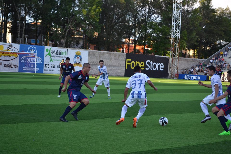 Club Tepatitlan